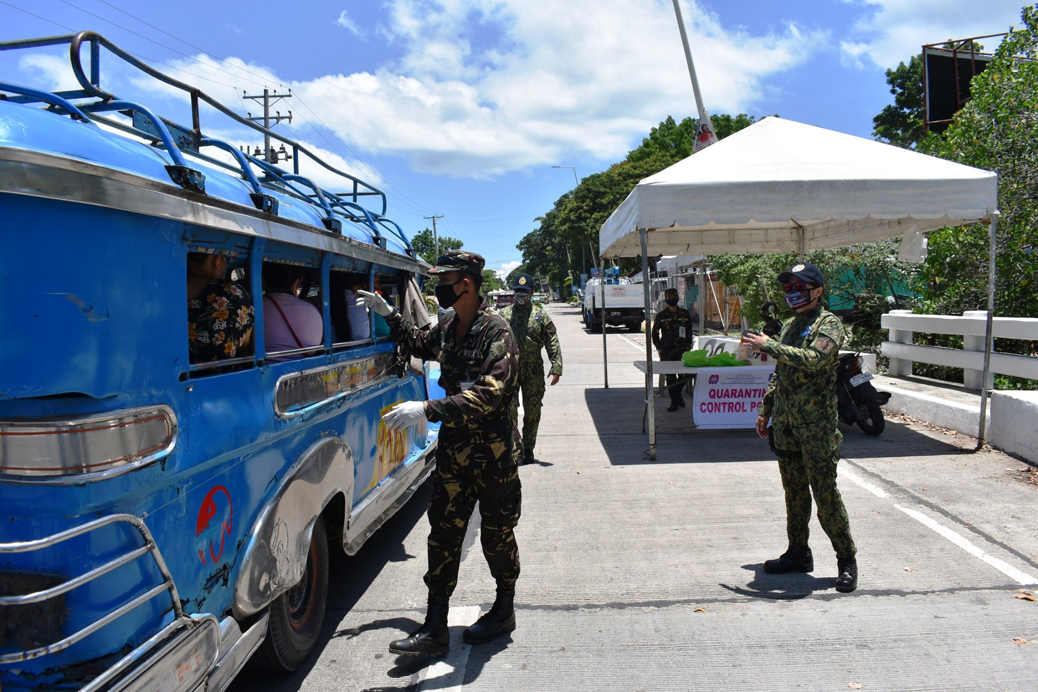 Cebuano: Bisan naa na sa GCQ ang Bohol, wala paundangi ang pagpaneguro nga maunod ang menos nga tawo sa mga malls sa syudad ug ubang lugar tapokanan hinungdan nga gipatuman pa gihapon ang passes. (PIA Bohol/RVO photo)